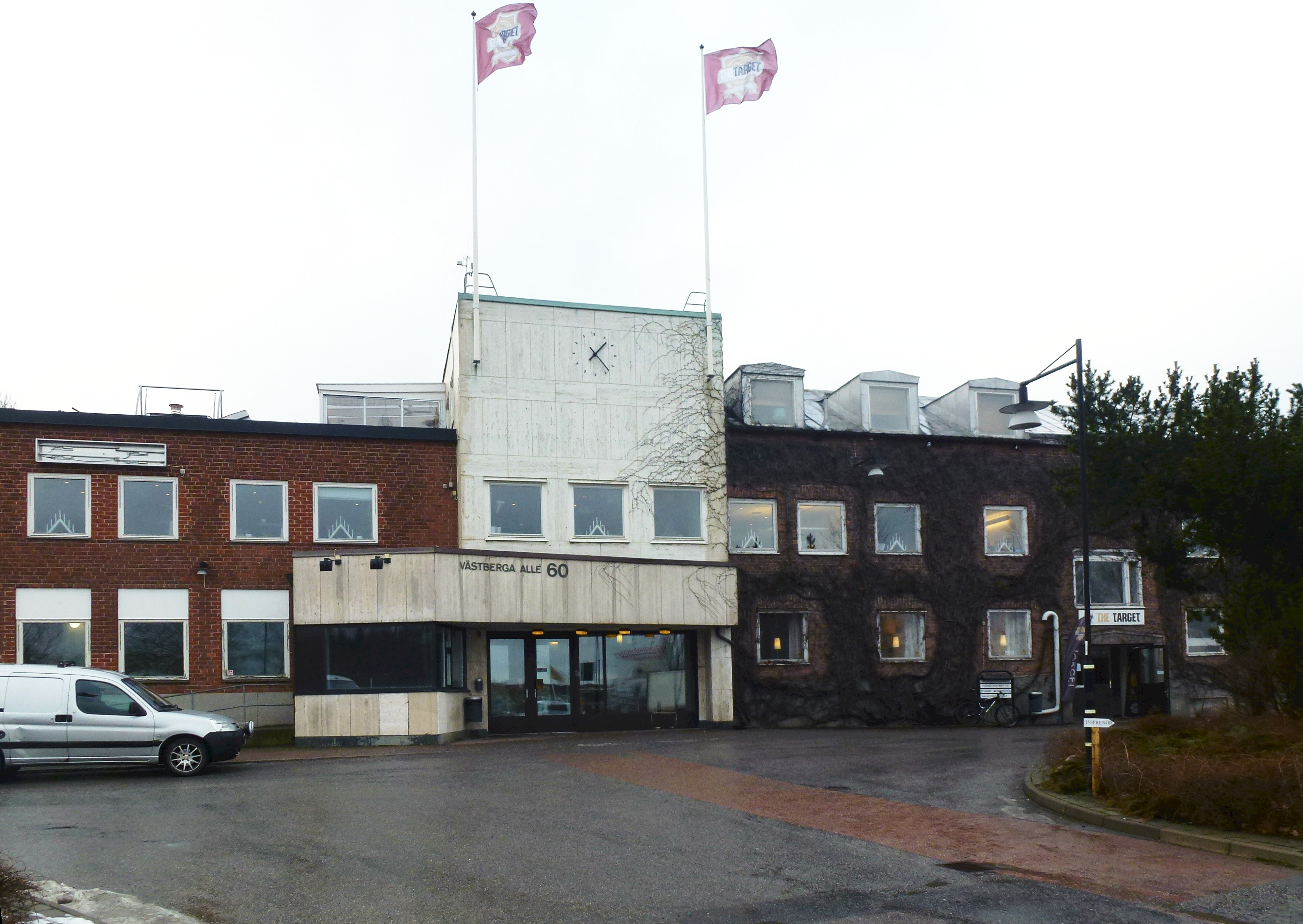 Före detta Liljeholmens Kabelfabrik, Västberga Allé 60